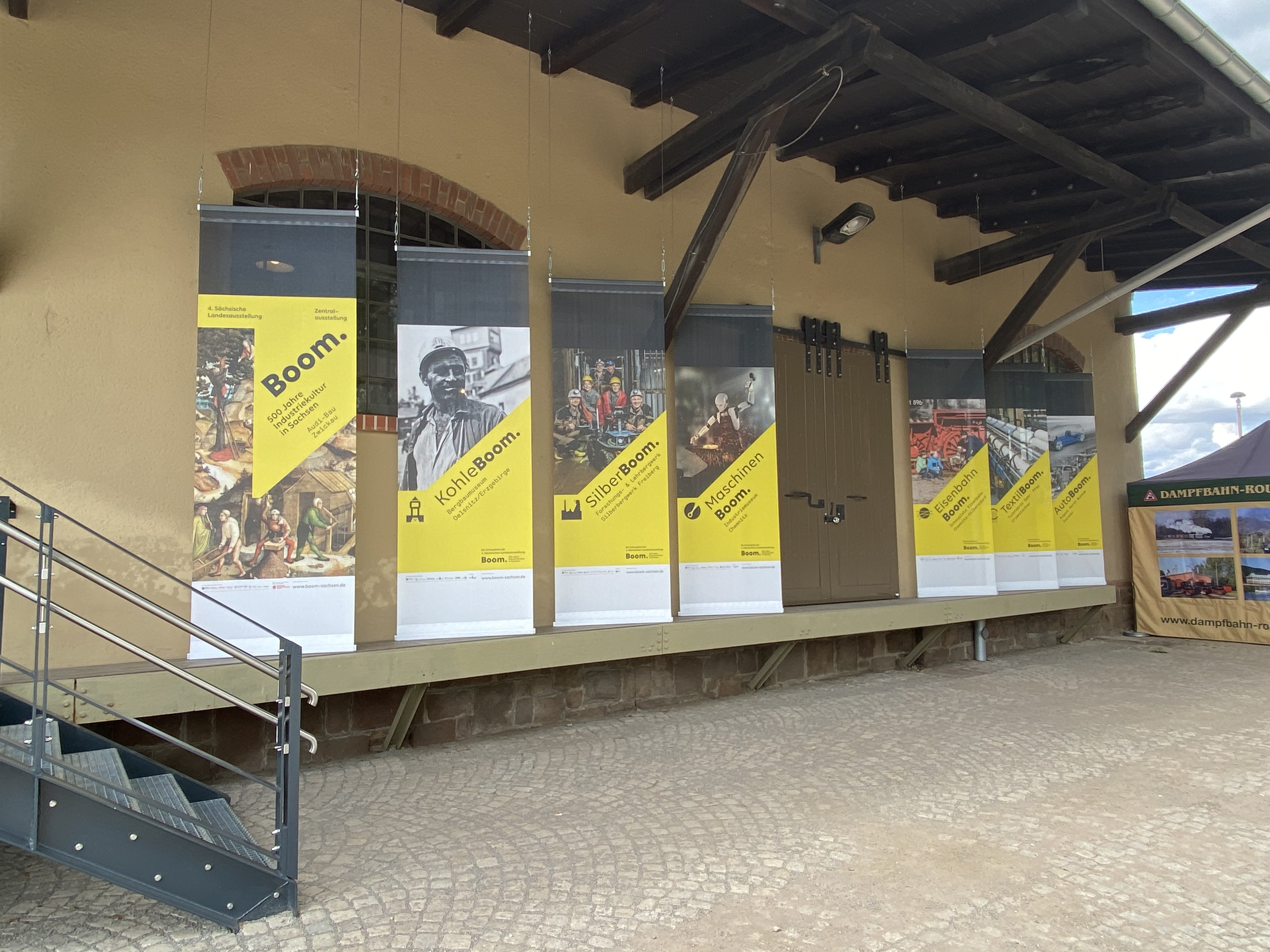 Eisenbahnmuseum Chemnitz Banner Landesausstellung (2020)